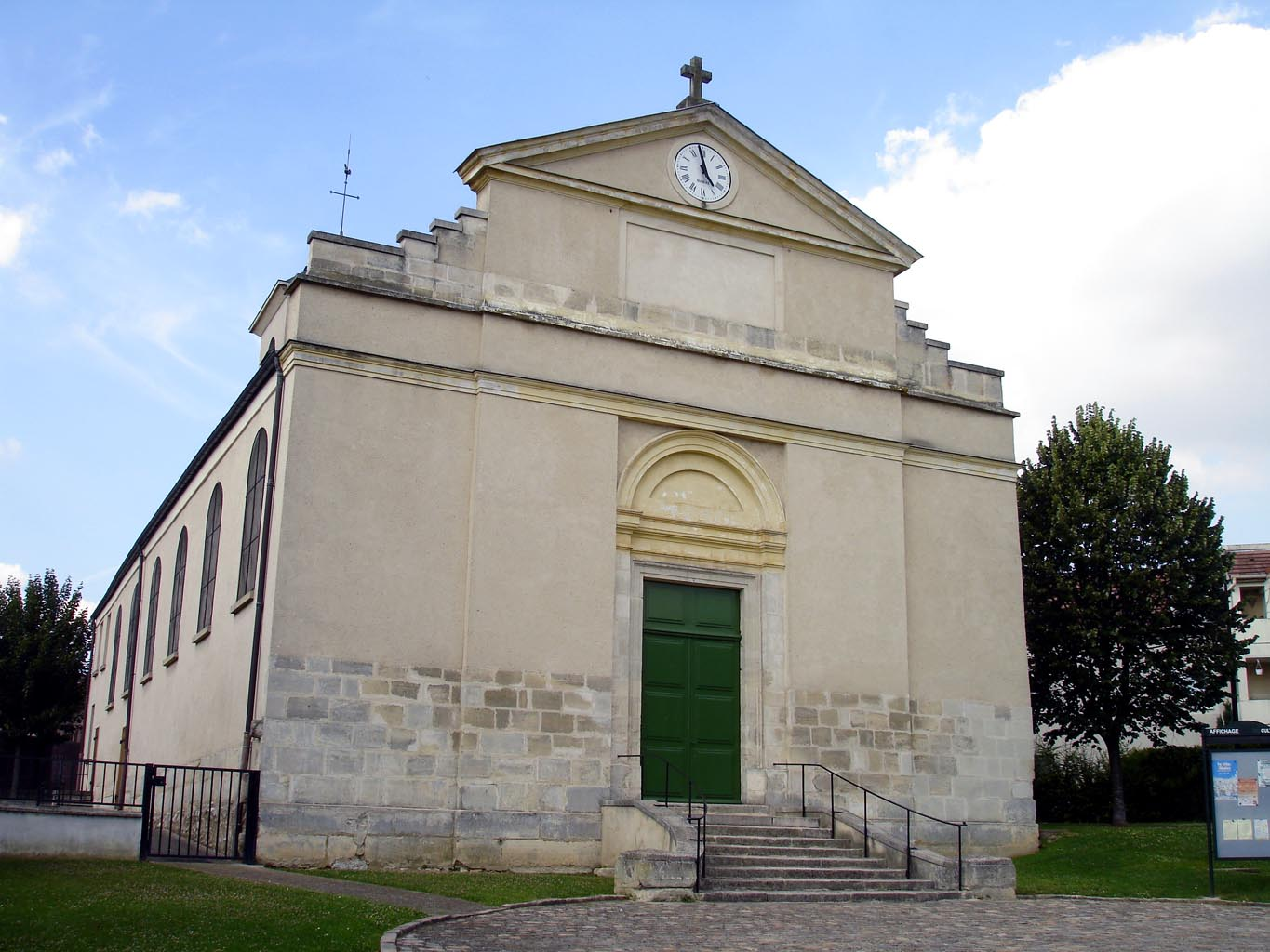 Façade de l'église Saint-Denis à Arnouville-lès-Gonesse (Val-d'Oise), France